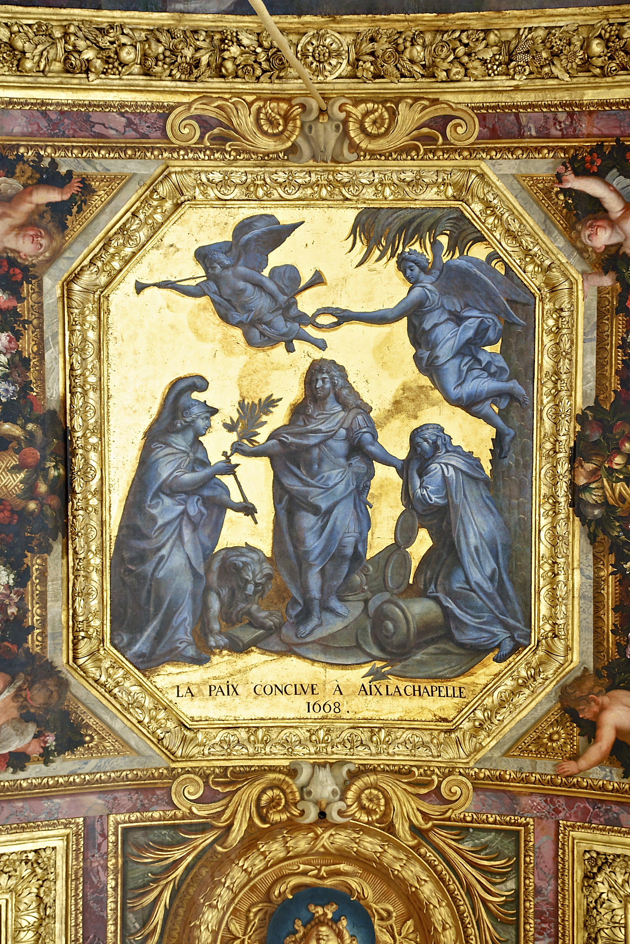 Un détail du plafond de la Galerie des Glaces au Château de Versailles, figurant en grisaille sur fond or la Paix d'Aix-la-Chapelle en 1668. par Charles Le Brun (1619–1690) Alternative names Charles LebrunDescriptionFrench painter, architect and decoratorDate of birth/death 24 February 1619 12 February 1690Location of birth/death Paris ParisWork location Paris (....-1642), Rome (1642-1646), Paris (1646-....), Versailles (1679-1684, 1886)Authority control : Q271676 VIAF: 59097680 ISNI: 0000 0001 2101 6536 ULAN: 500016215 LCCN: n78072045 WGA: LE BRUN, Charles WorldCat creator QS:P170,Q271676